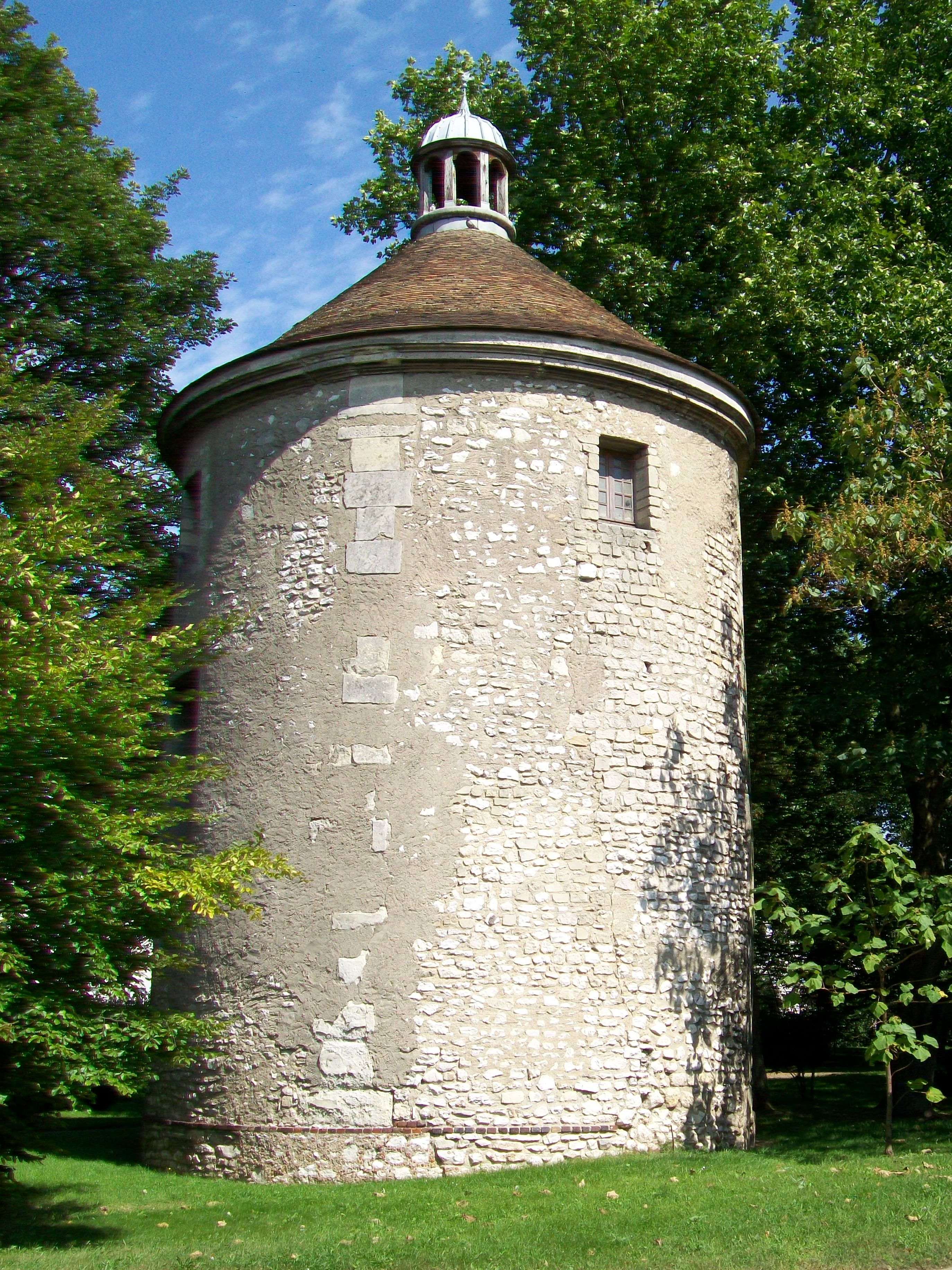 Le colombier d'Orgemont, 1 rue de Paris. Il date probablement du XVIIIe siècle et a été transformé en logement au début du XXe siècle. Lors de son inscription au titre de Monuments historiques en 1973, il avait été abandonné pendant plusieurs années.